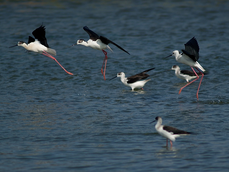 Himantopus himantopus（高蹺鴴．黑翅長腳鷸）, Changhua County, Taiwan, 2008.